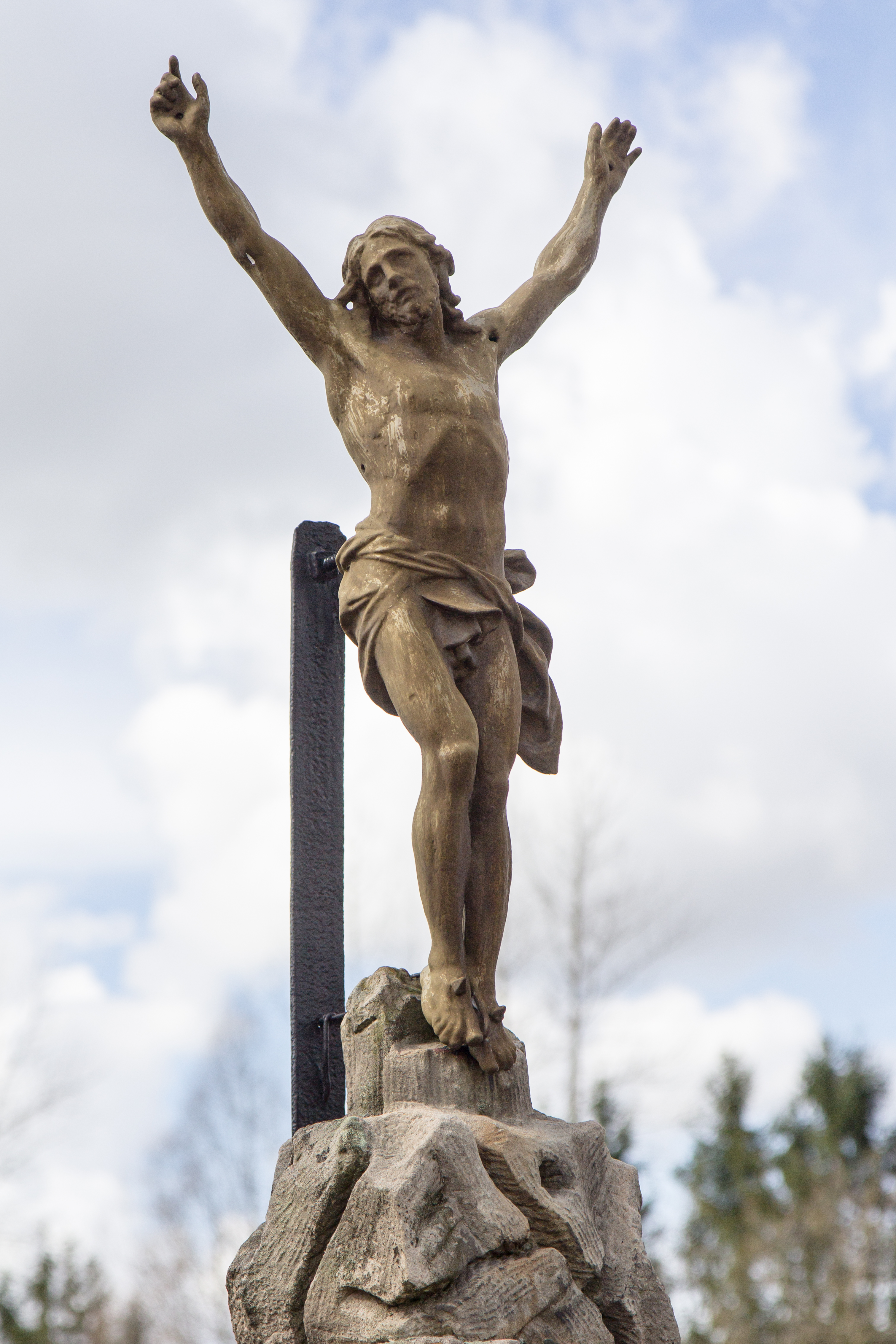 Kreuz von Saarburg, 1914 von Granatsplittr getroffenes Kruzifixensemble, bei dem der Korpus erhalten wurde.